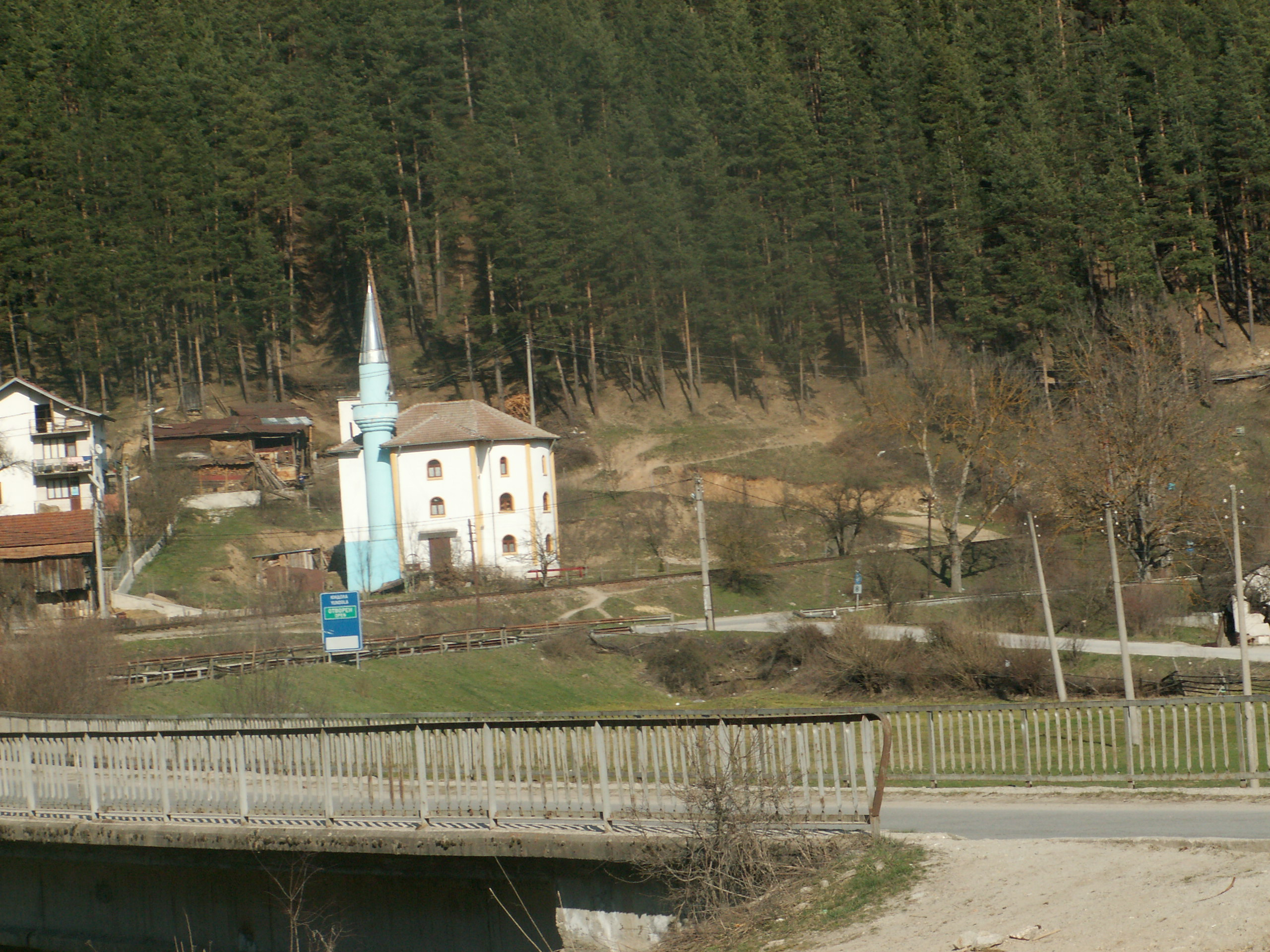 Moschee von Tscherna Mesta, vom Zug aus gesehen